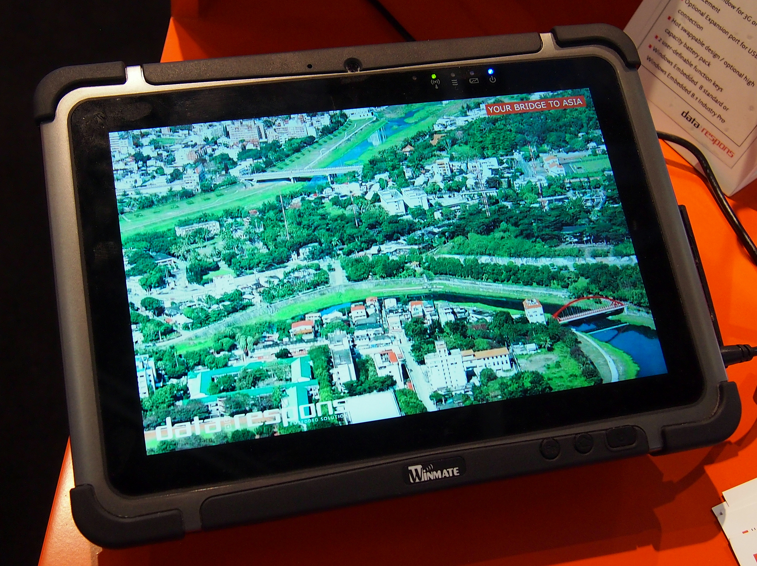 Embedded World 2014: Winmate Tablet-PC in Rugged Computing Ausführung mit Kantenschutz